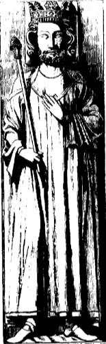 Gisant de Hugues Capet (c.939/41 - 996))